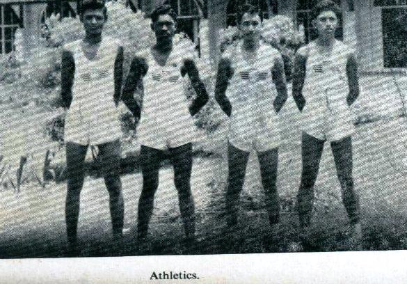 Olahragawan, 1954